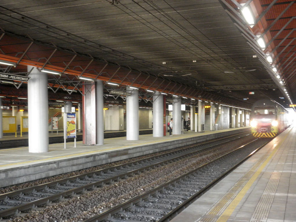 Stazione di Milano Nord Bovisa, piano binari.